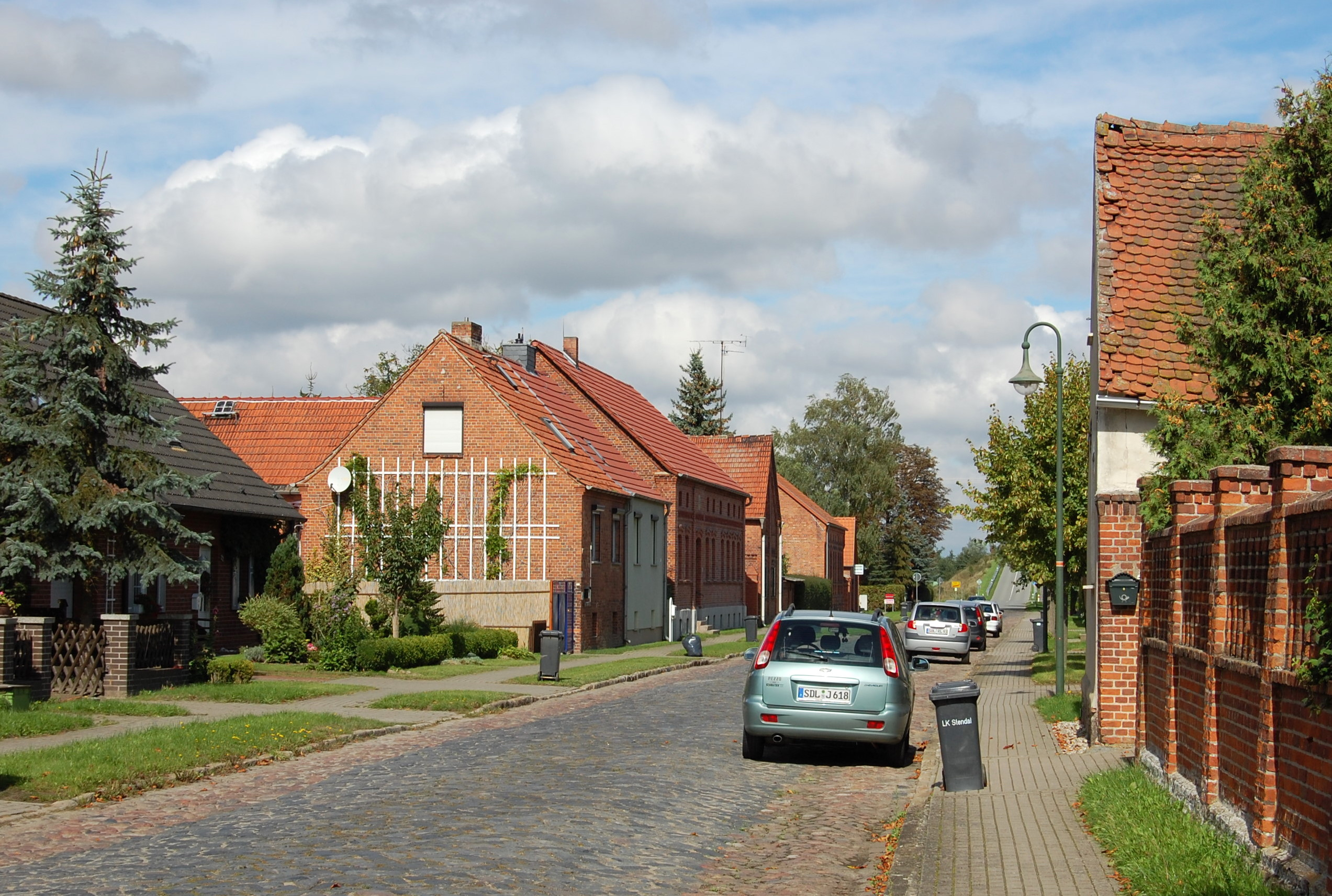 Straße durch Döbbelin